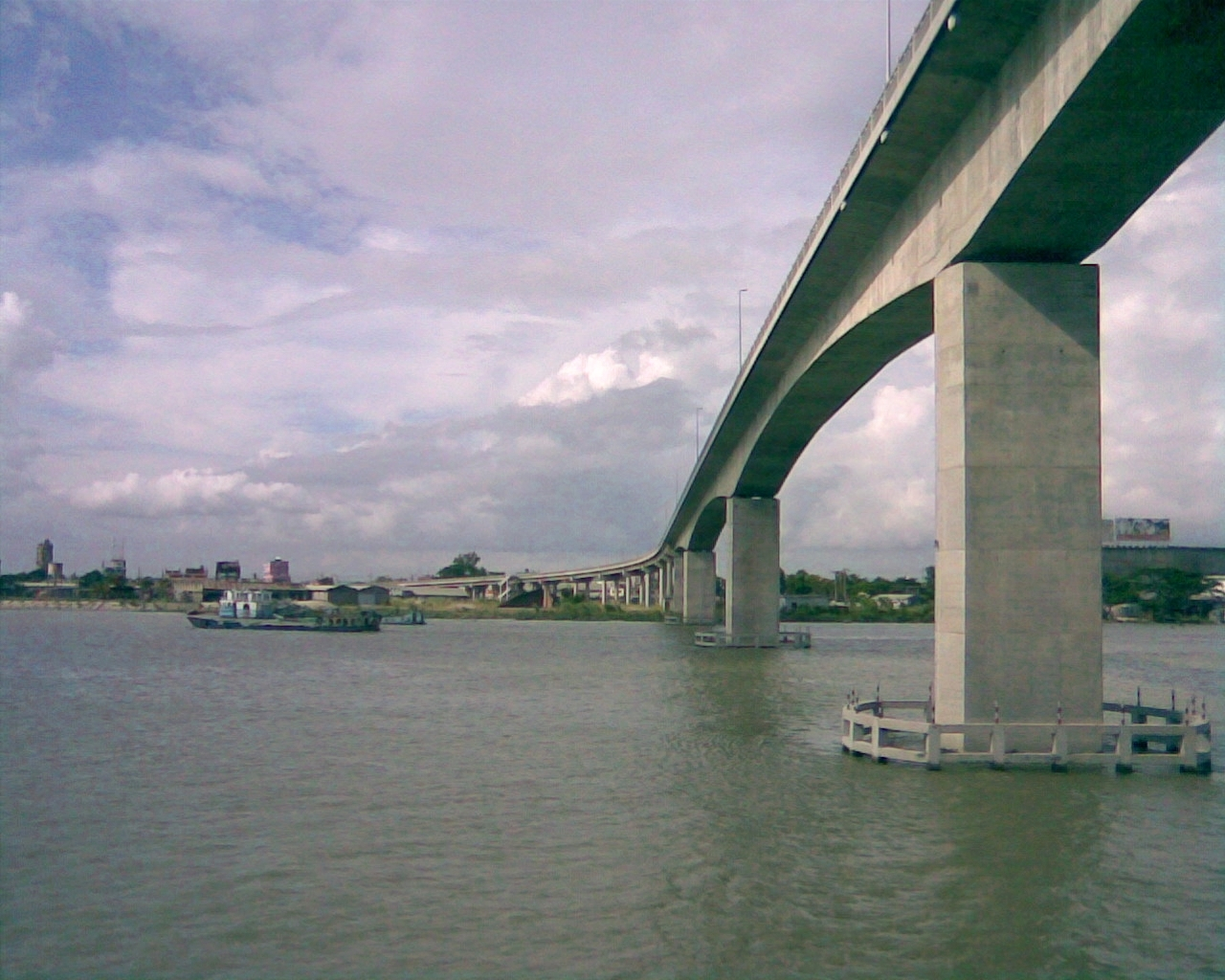 Munshiganj Bridge, Munshiganj. Bangladesh